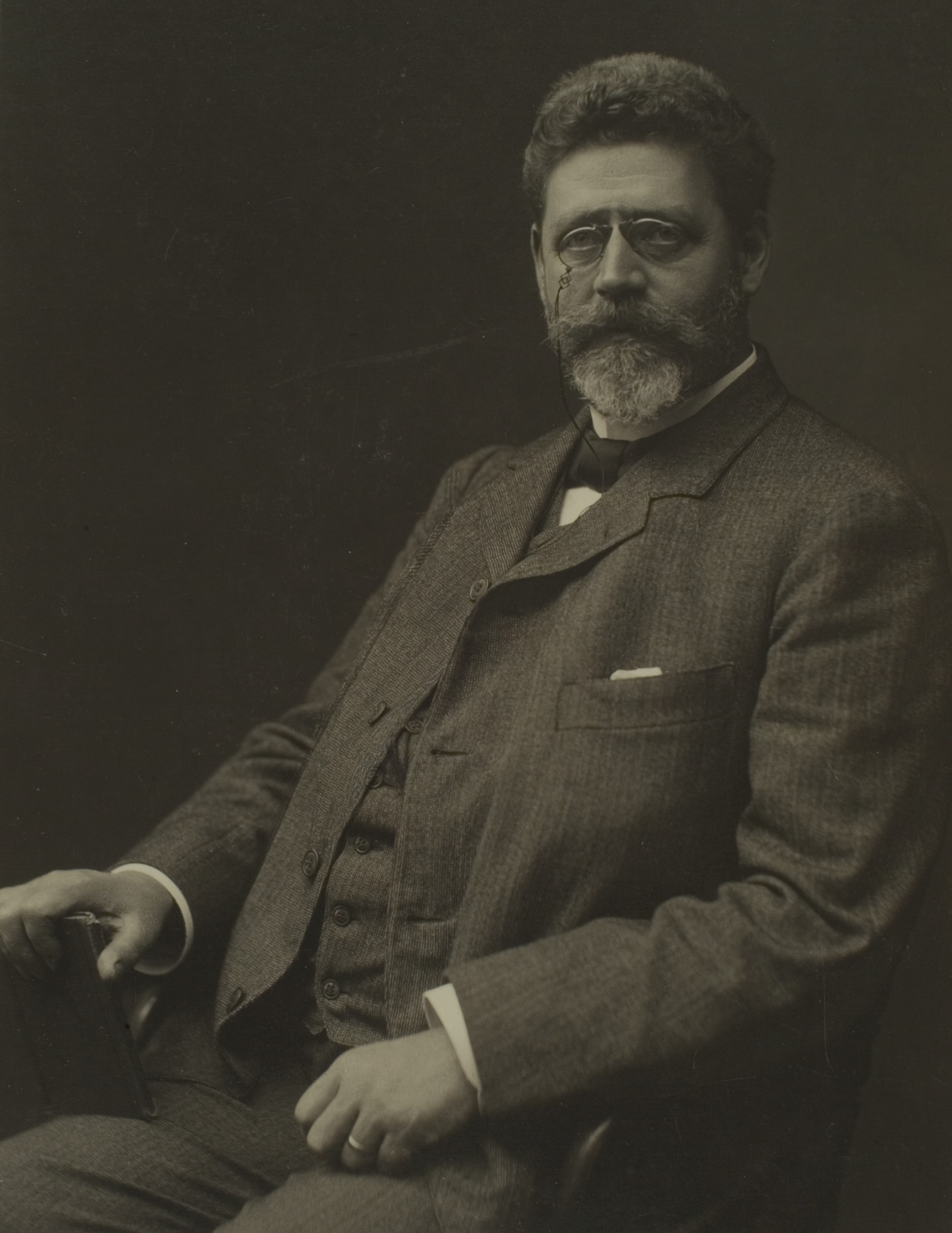 Karl Friedrich Theodor Rathgen, Nationalökonom, 1900–1907 Professor in Heidelberg